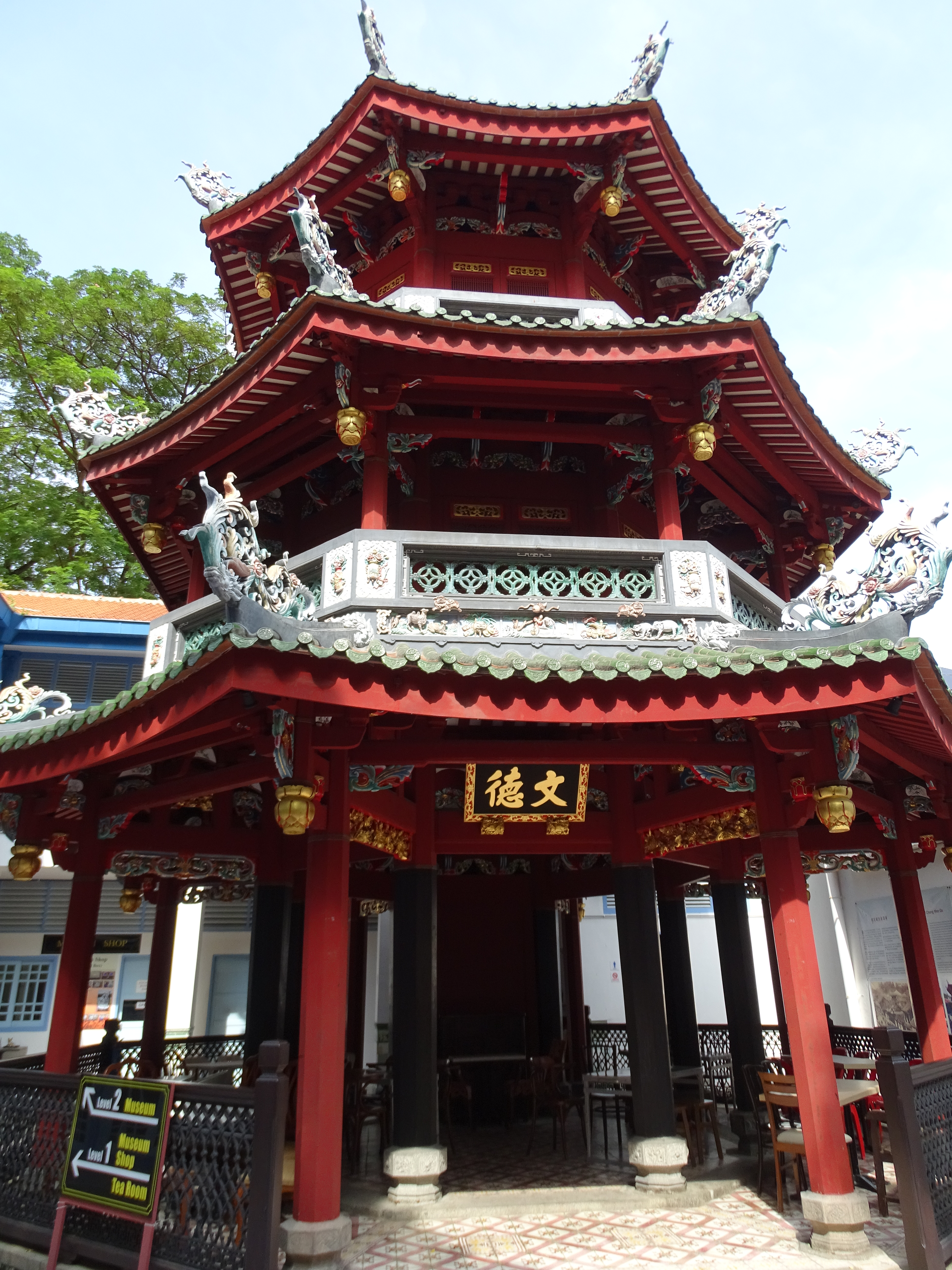 Keng Teck Huay Pagoda der Tempelanlage Thian Hock Keng, seit 1840 religiöses und Kulturzentrum der Hokkien-Chinesen in Singapur, Zeitweilig Sitz der Singapore Hokkien Association, Chinatown, Singapur